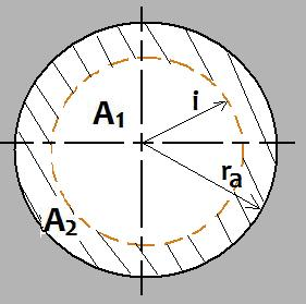 Skizze für den Trägheitsradius eines Zylinders